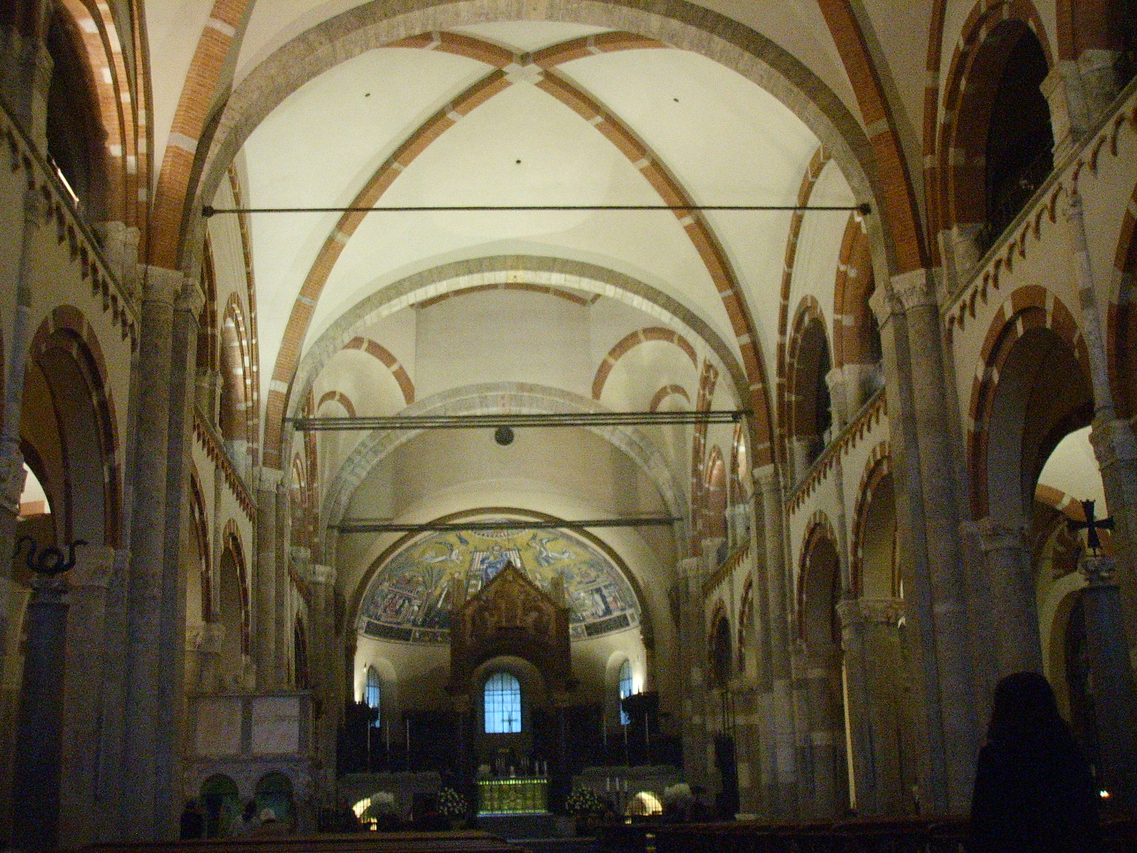 Milano, sant'ambrogio, interno